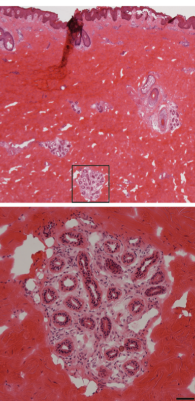 Figura 1. Glándula in situ en un corte de piel. Arriba: corte histológico a bajo aumento en el recuadro. Abajo: mayor aumento.